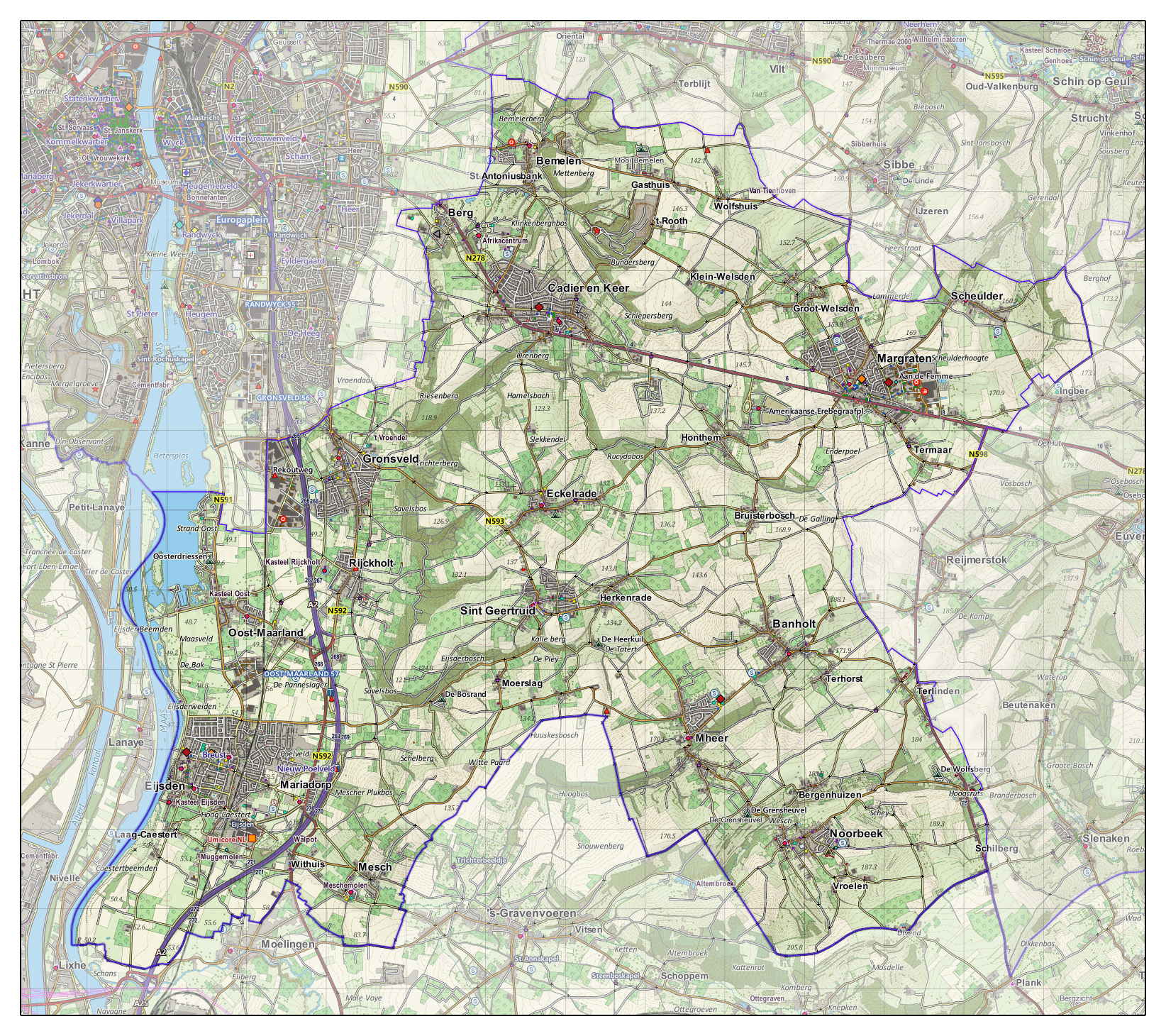 Topografische kaart van gemeente Eijsden-Margraten (2013). Op basis van de GML open geodata van de BRT/Top10NL (basisregistratie Topografie, Kadaster 2011), vrijgegeven door Kadaster onder de Creative Commons BY licentie. Samenstelling en kleurenschema: Jan-Willem van Aalst, met QuantumGIS en Photoshop. Zie ook de Legenda.